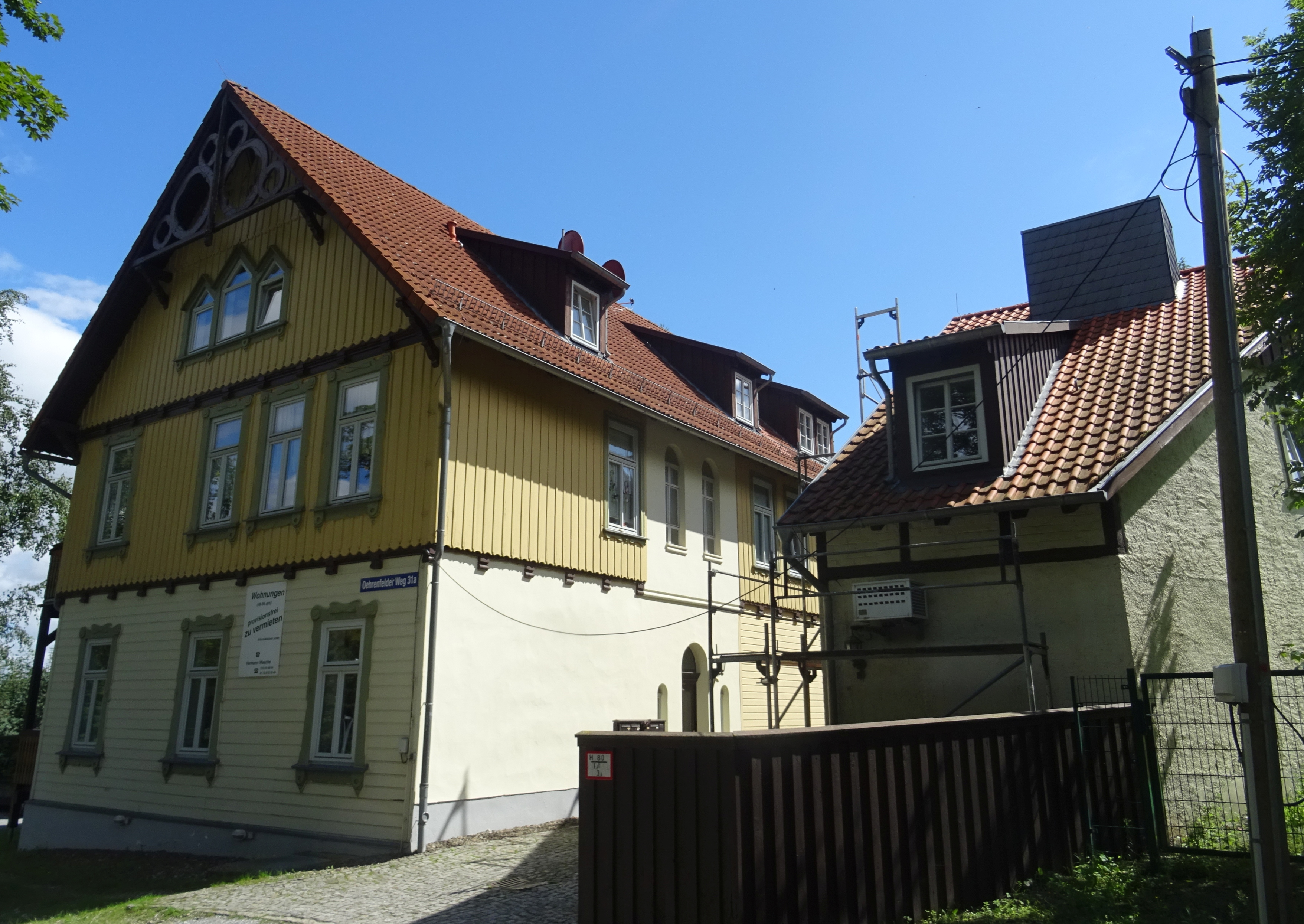 Darlingerode, denkmalgeschütztes Wohnhaus Oehrenfelder Weg 31a